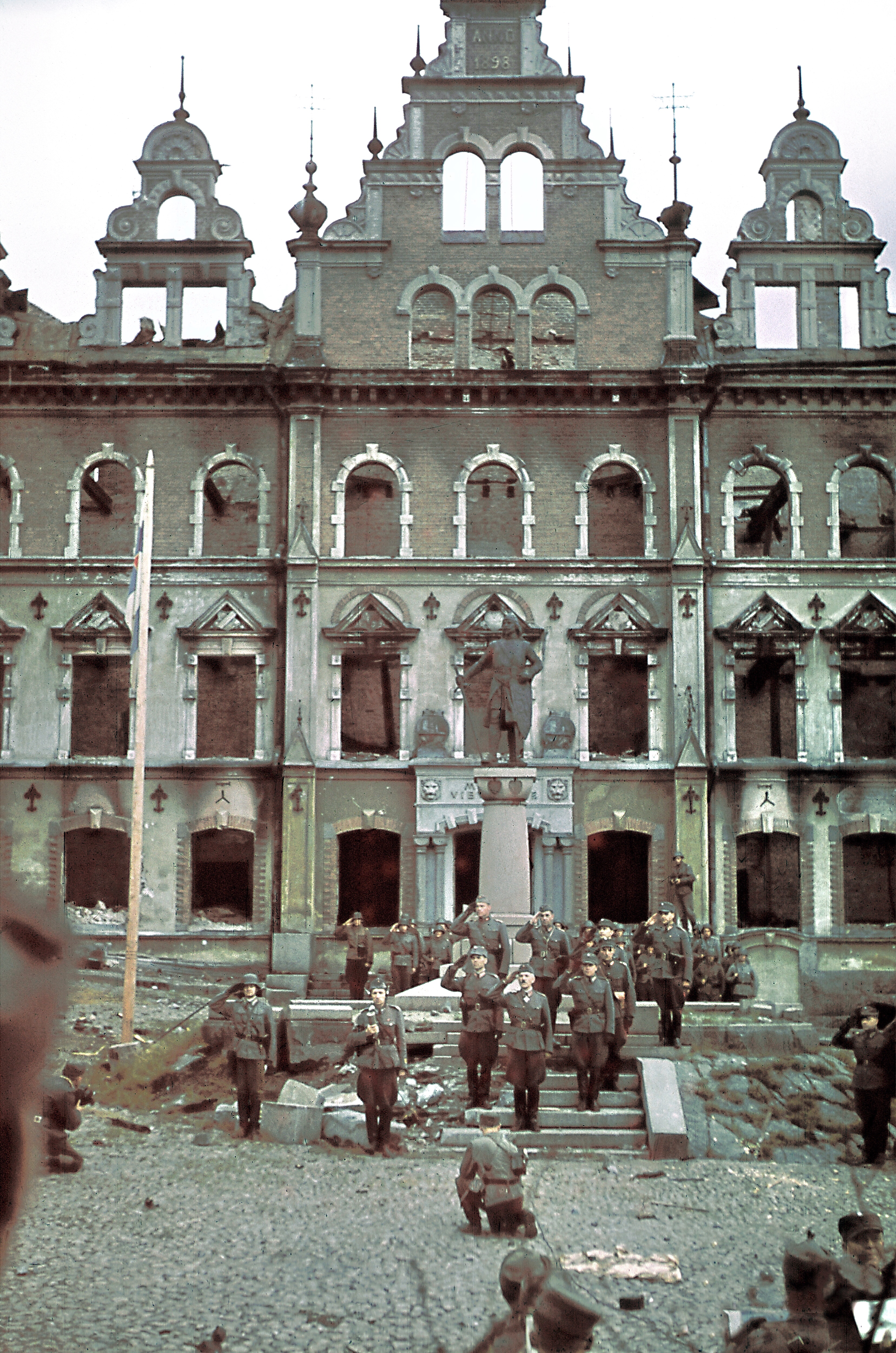 Viipurin paraati Torkkeli Knuutinpojan patsaalla. Keskellä paraatia vastanottanut Karl Lennart Oesch, vasemmalla kypärä päässään eversti Aladar Paasonen 31.8.1941